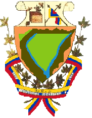 Escudo del municipio Monseñor José Vicente de Unda. Estado Portuguesa. Venezuela